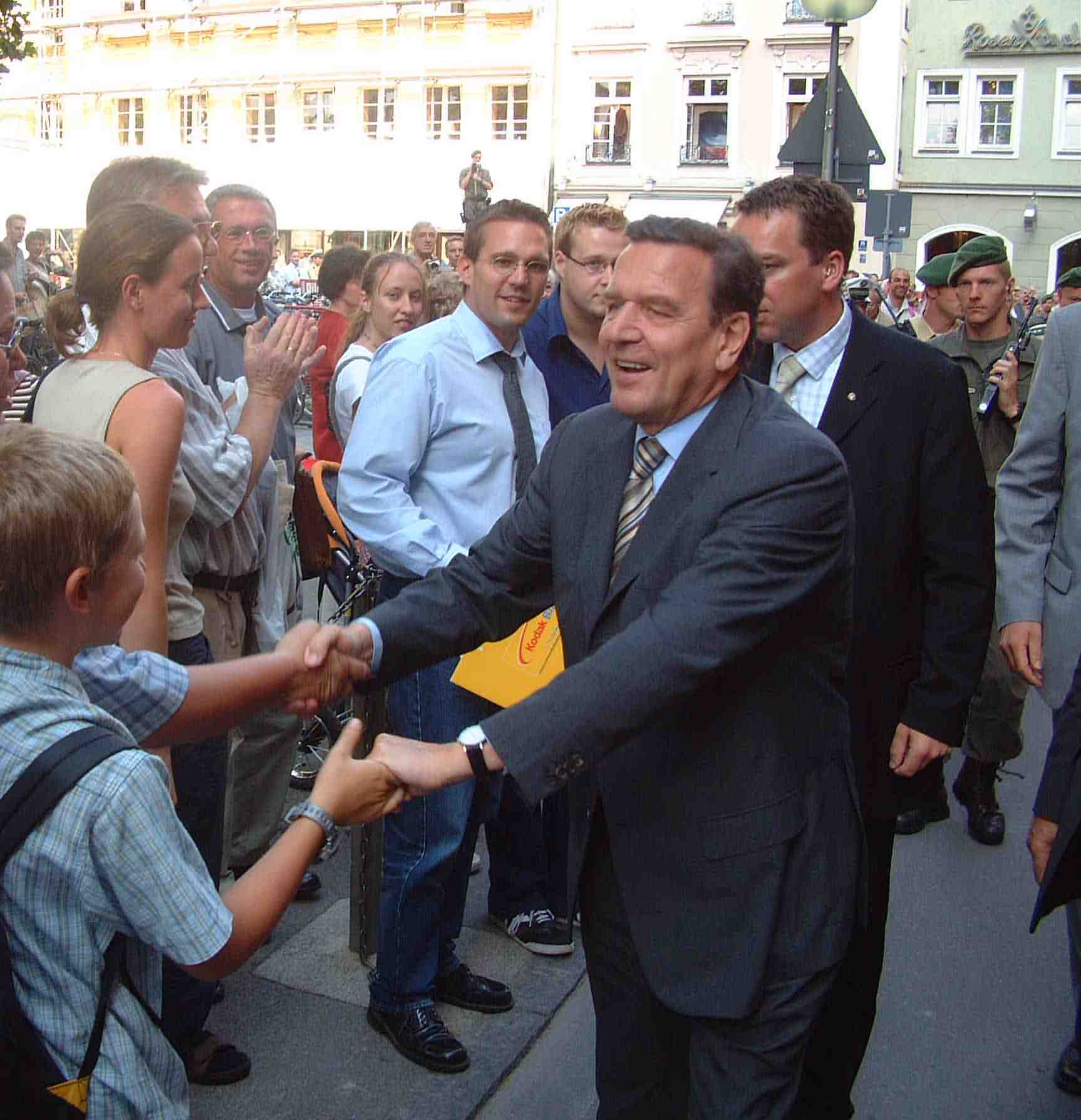 Gerhard Schröder bei einem Wahlkampfbesuch in München Sommer 2002